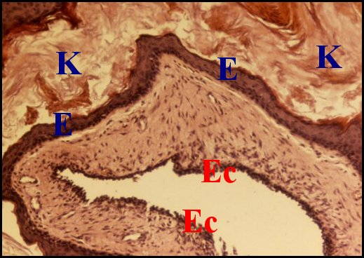 Poche de rétraction avec ses deux épithéliums